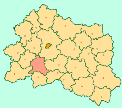 Orel Oblast map by Al Silonov Карта районов Орловской области